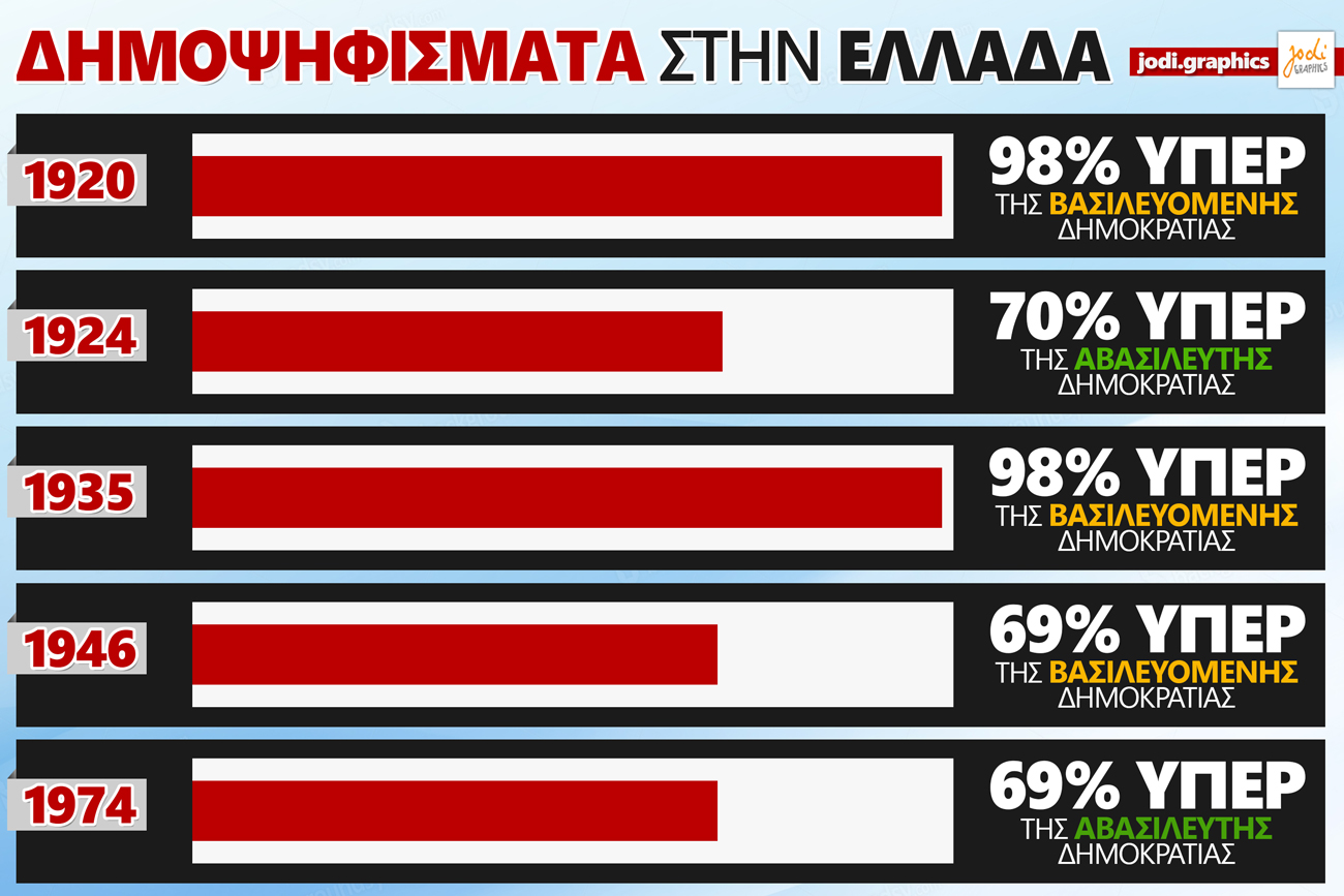 Όλα τα δημοψηφίσματα που έχουν γίνει στην Ελλάδα